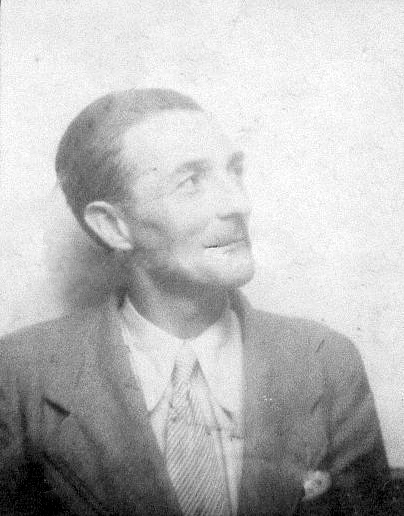 photo d'identité de Maurice Thédié